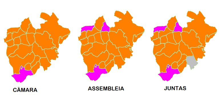 Mapa ilustrativo do partido mais votado por freguesia em Santa Maria da Feira (2017)